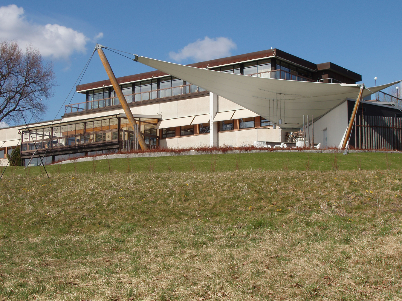 Rönneberga kurs- och konferensanläggning på Lidingö. Vy från sjösidan med Segelterassen framför huvudbyggnaden.